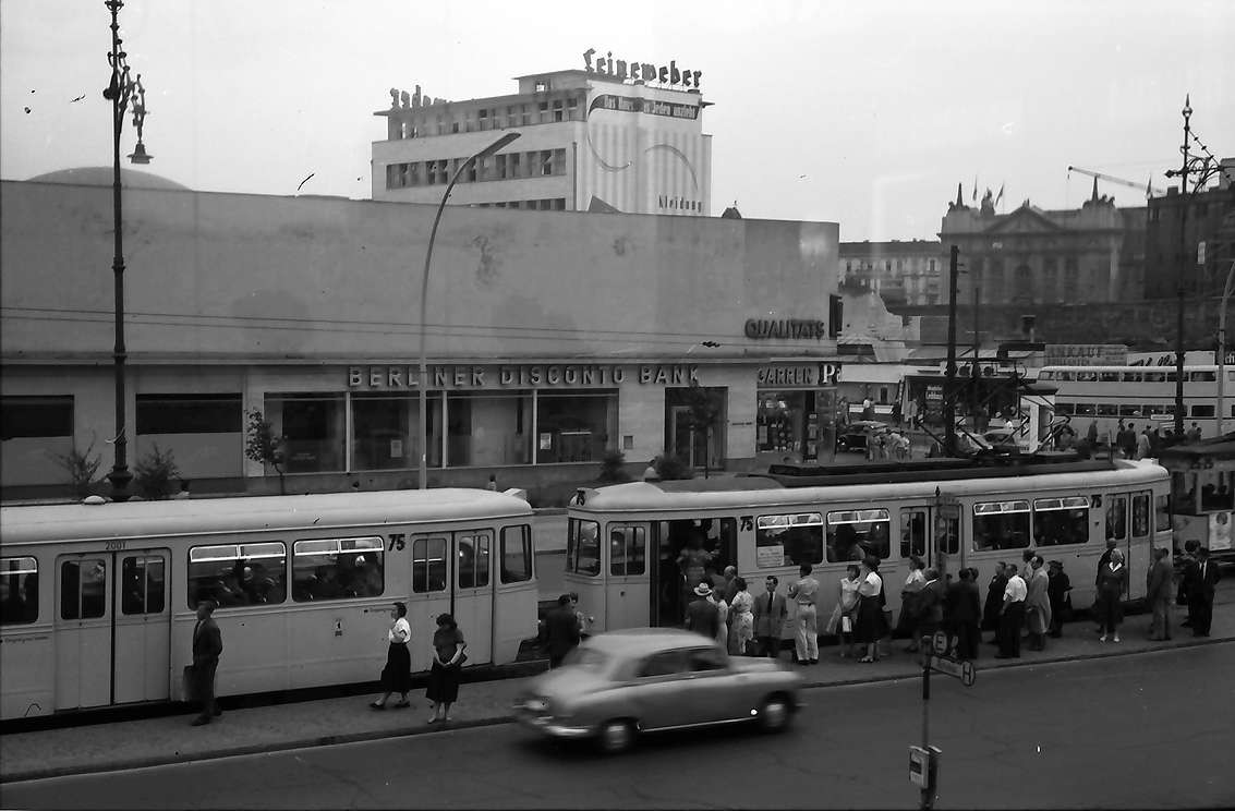 Hardenbergstraße zwischen Joachimsthaler Straße und Breitscheidplatz in Berlin-Charlottenburg.